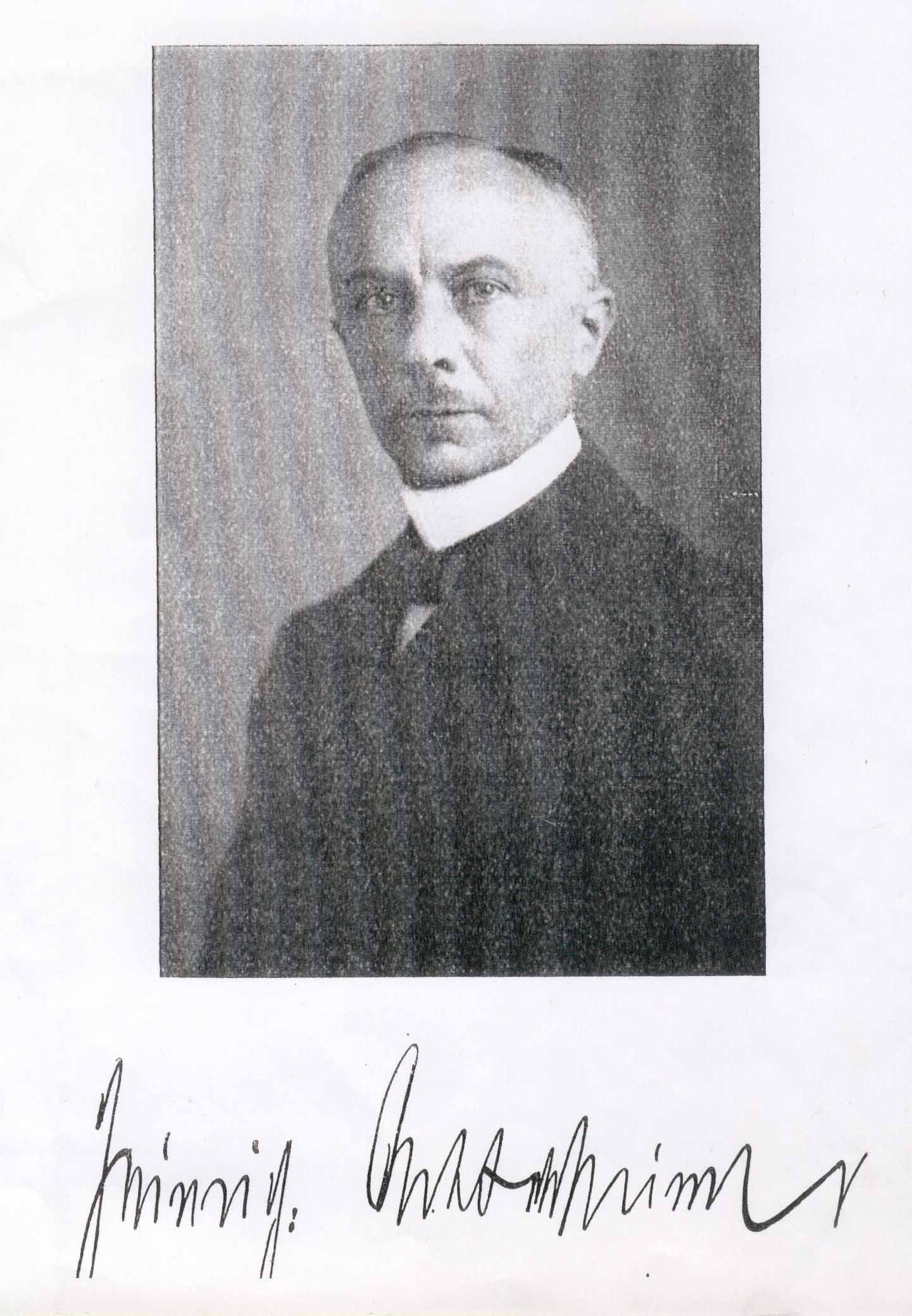 Heinrich Bechtolsheimer, Heimatschriftsteller